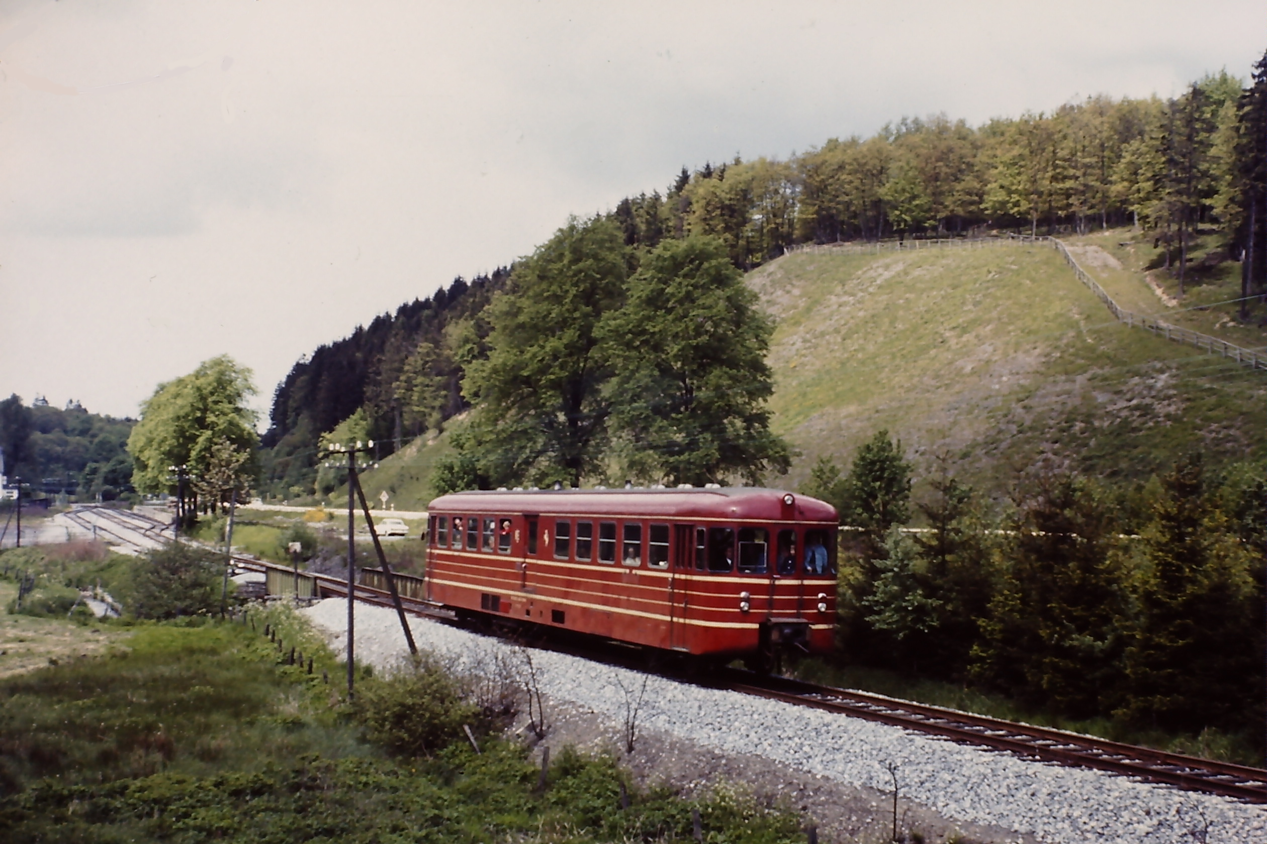 WLE VT 1033 bei einer Sonderfahrt für die DGEG auf der Möhnetalbahn